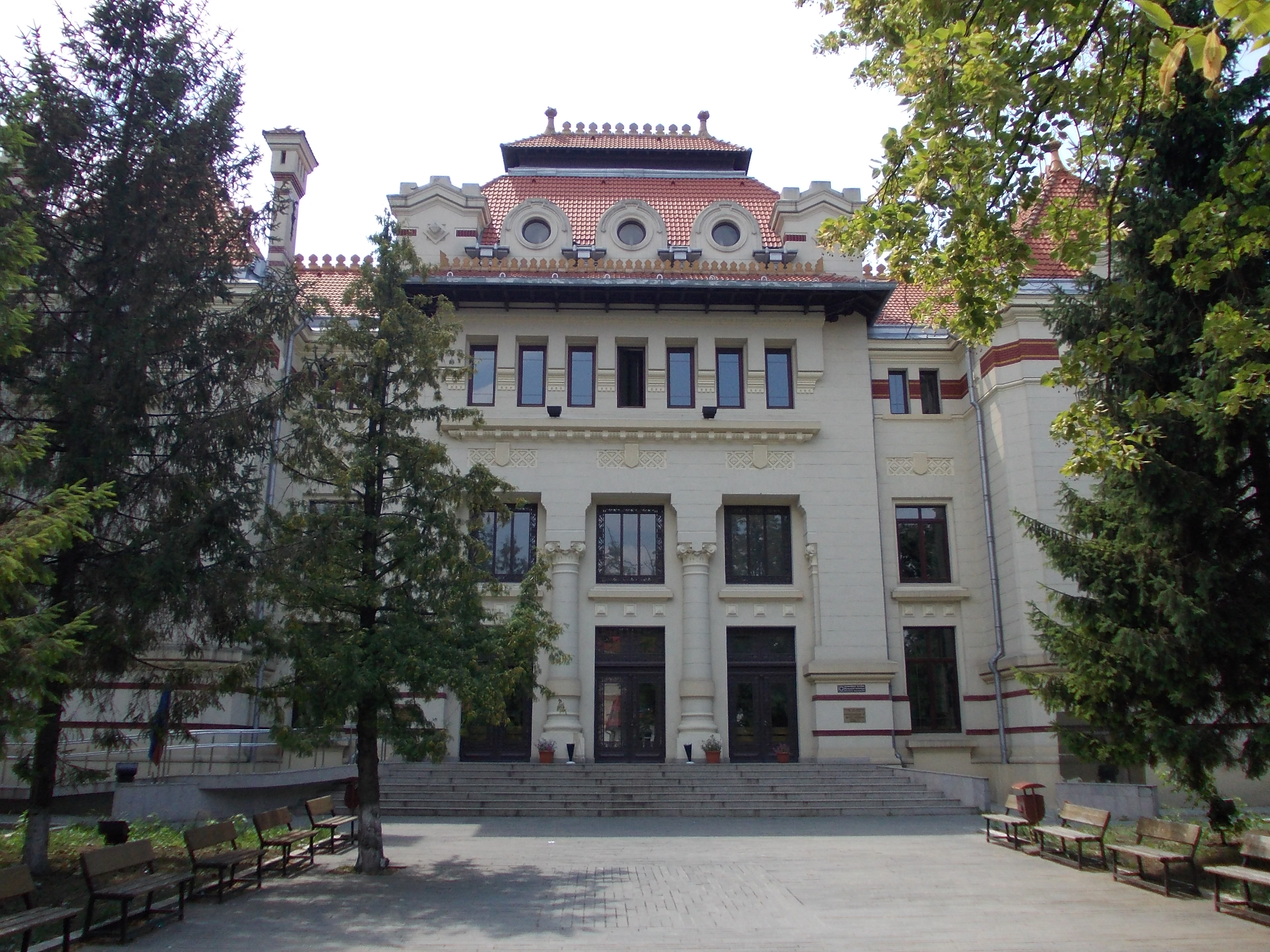 Clădire de patrimoniu în Botoşani